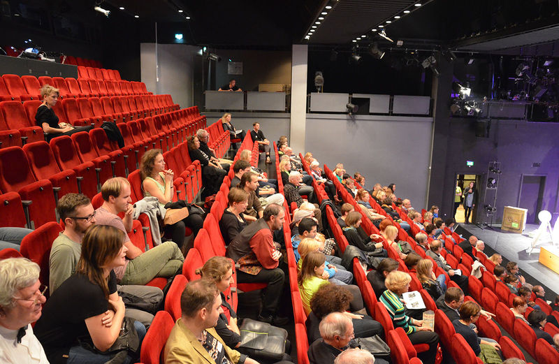 Dresden-Cotta Theater der Jungen Generation Blick in den Saal des Theaters Junge Generation während einer Requisiten-Versteigerung anlässlich des 65. Theatergeburtstages am 15. Oktober 2014 20:33 Uhr